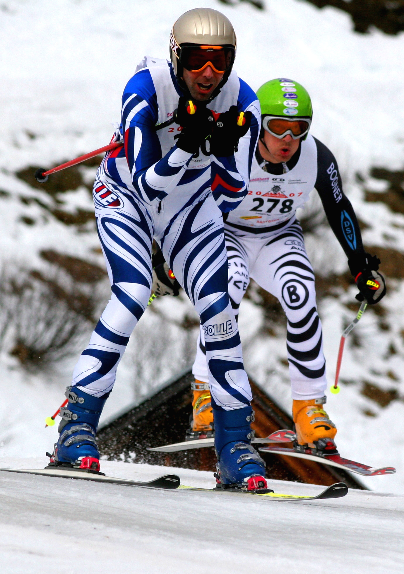 Internationale Inferno-Rennen Mürren